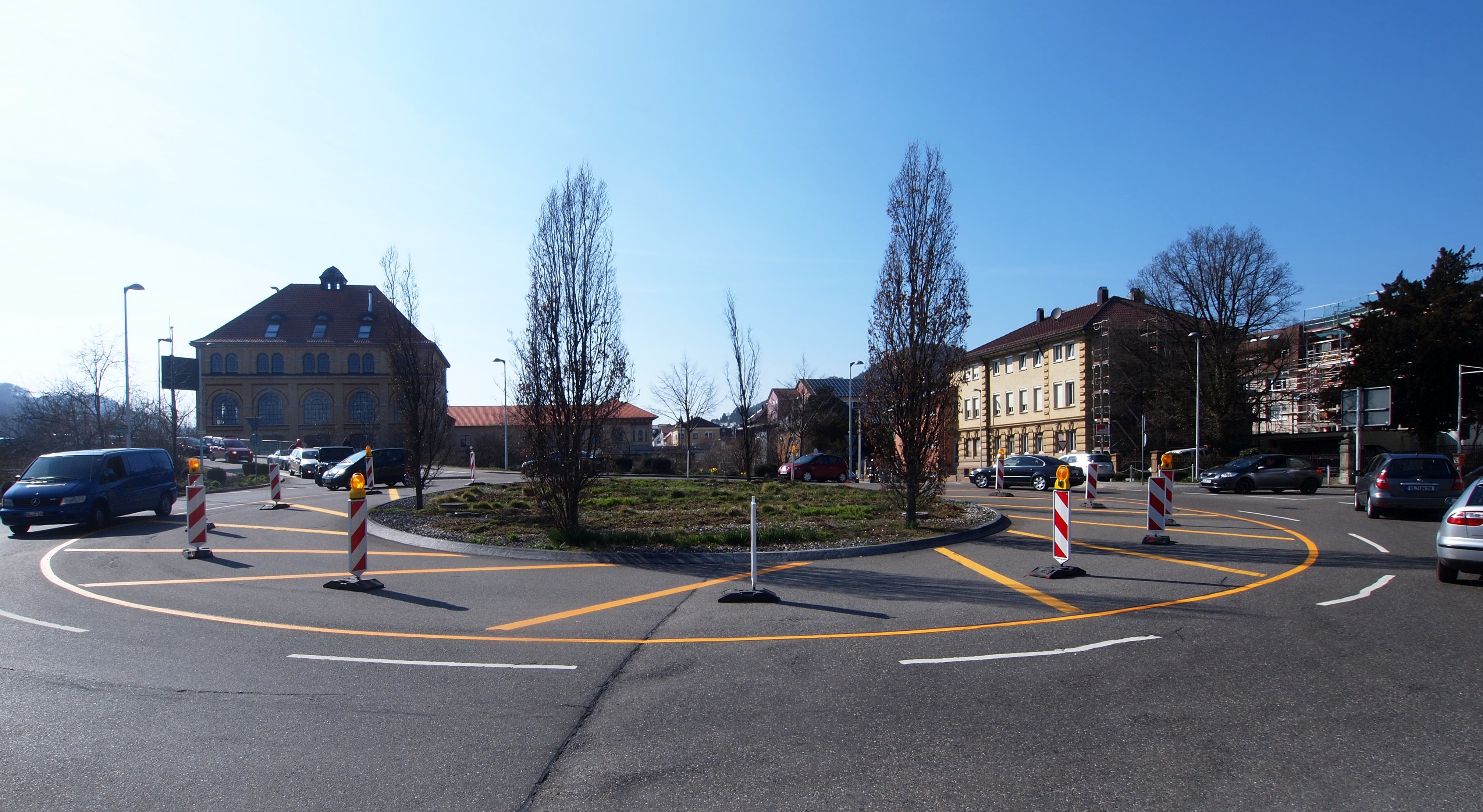 Kreisverkehr mit stillgelegter Überholspur